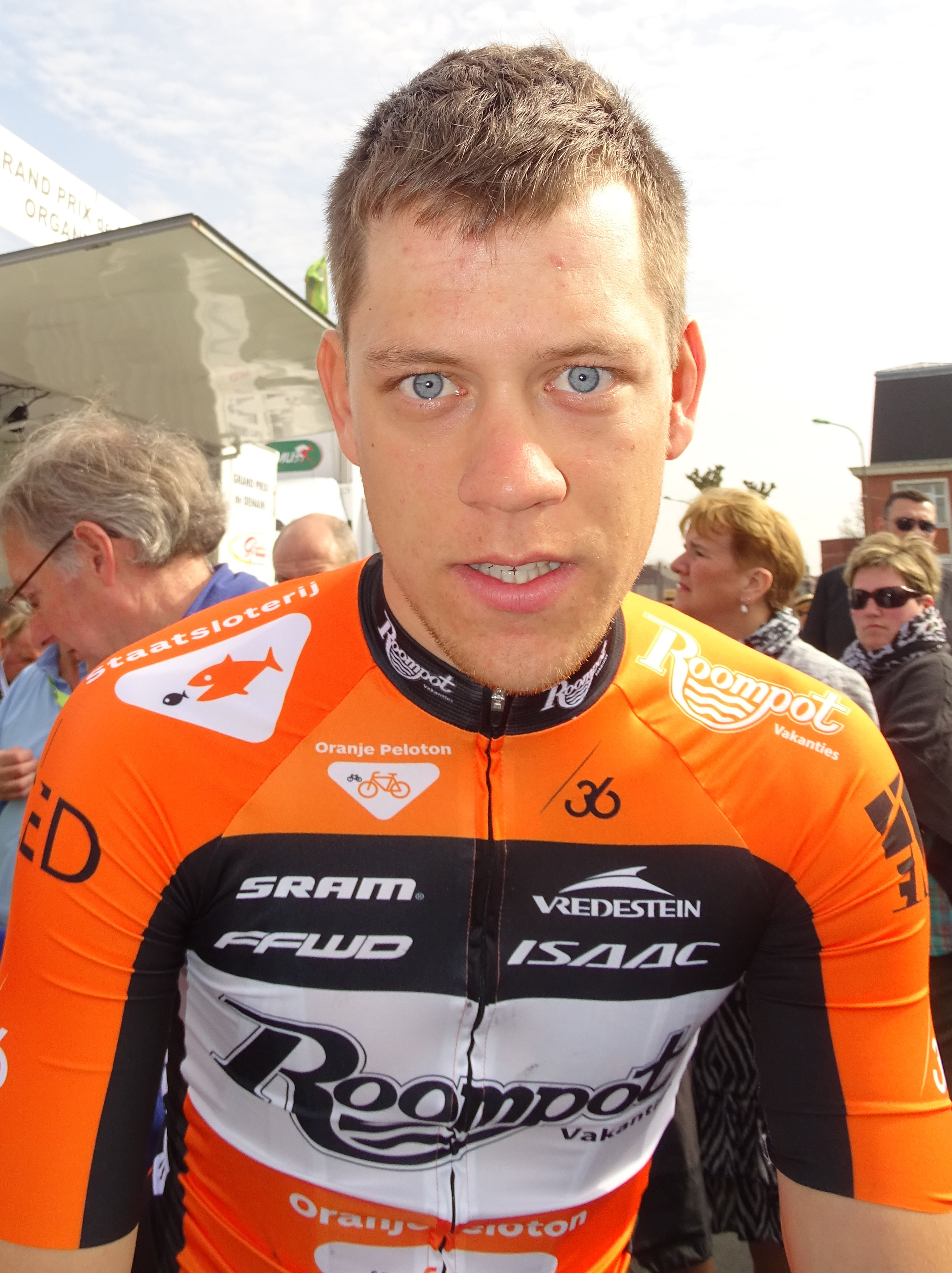 Reportage réalisé le jeudi 16 avril à l'occasion du départ et de l'arrivée du Grand Prix de Denain 2015 à Denain, Nord, Nord-Pas-de-Calais, France.